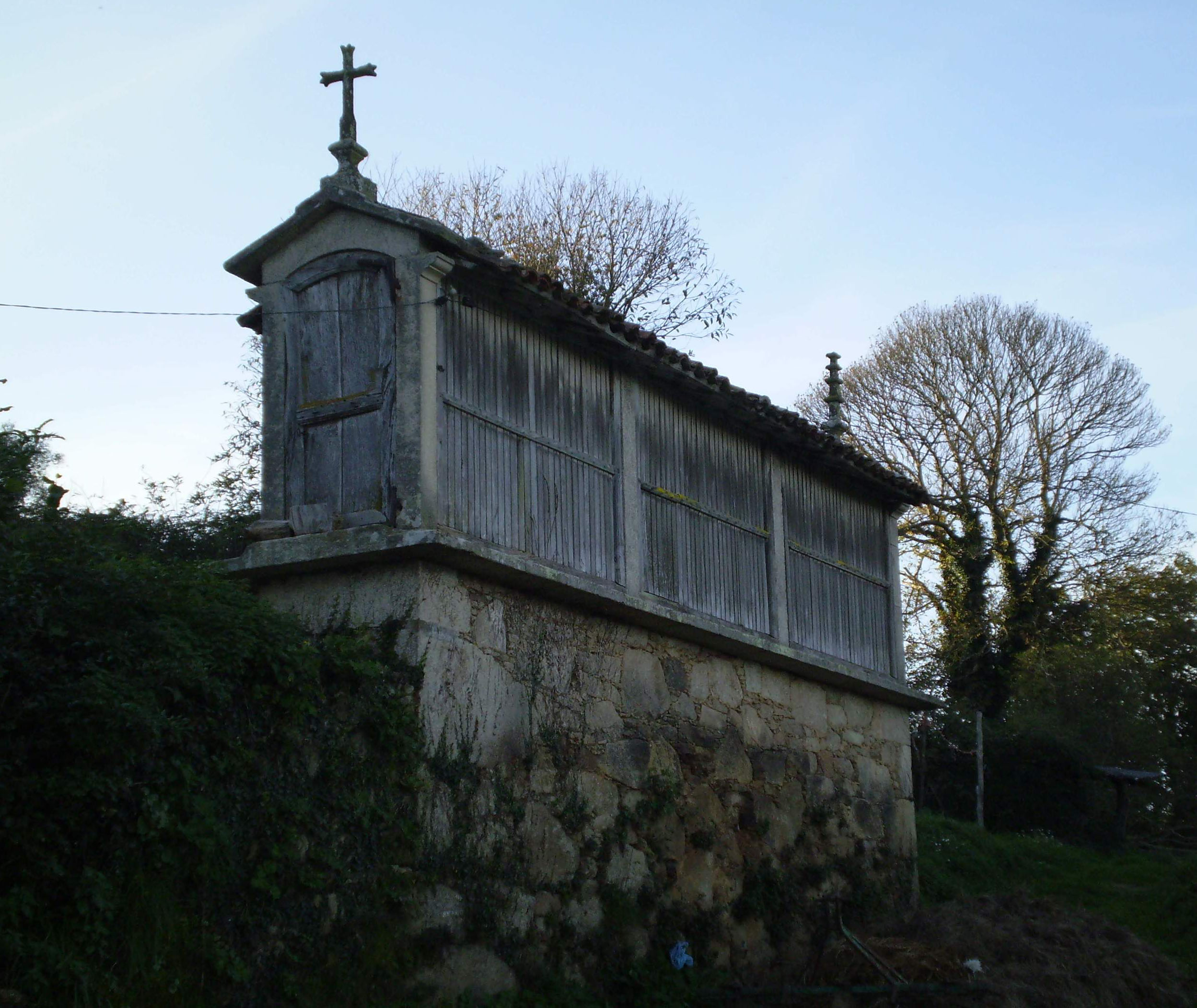 Hórreo tipo mahía, sobre soleira de mampostería, de tres claros, con porta penal e coroado por cruz latina e lampión fusiforme. Ubicado en Vilasante, parroquia de Facha no concello de Antas de Ulla